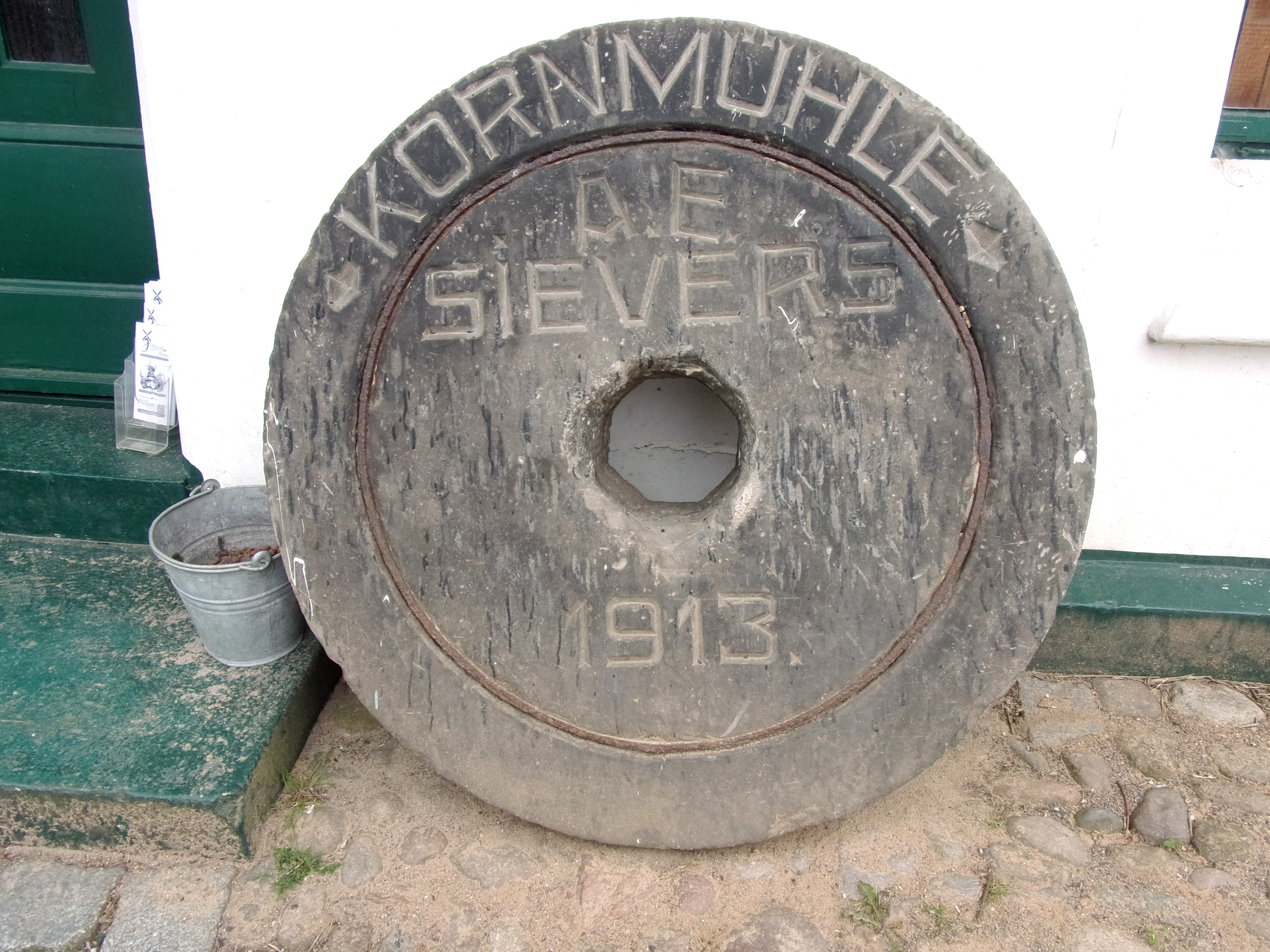 Die Windmühle Johanna an der Schönenfelder Straße 99a gilt als Wahrzeichen von Wilhelmsburg. Der Galerieholländer mit Jalousieflügeln und Windrose wurde 1875 wieder aufgebaut, die Vorgängermühle brannte aus. Auftraggeber war der Wilhelmsburger Müller Christoph Cordes, Baumeister war F. Dobbertin aus Boizenburg. Zum Ensemble gehört u. a. die Mühle, das Müllerhaus, ein neu gebautes Backhaus, das Mühlencafe´, und das Museum sowie diverse Veranstaltungen. Die Mühle nimmt regelmäßig am Deutschen Mühlentag teil. Im Foto der Mühlstein von Erwin Sievers. Mehr Infos unter dem folgendem Link: This is a photograph of an architectural monument.